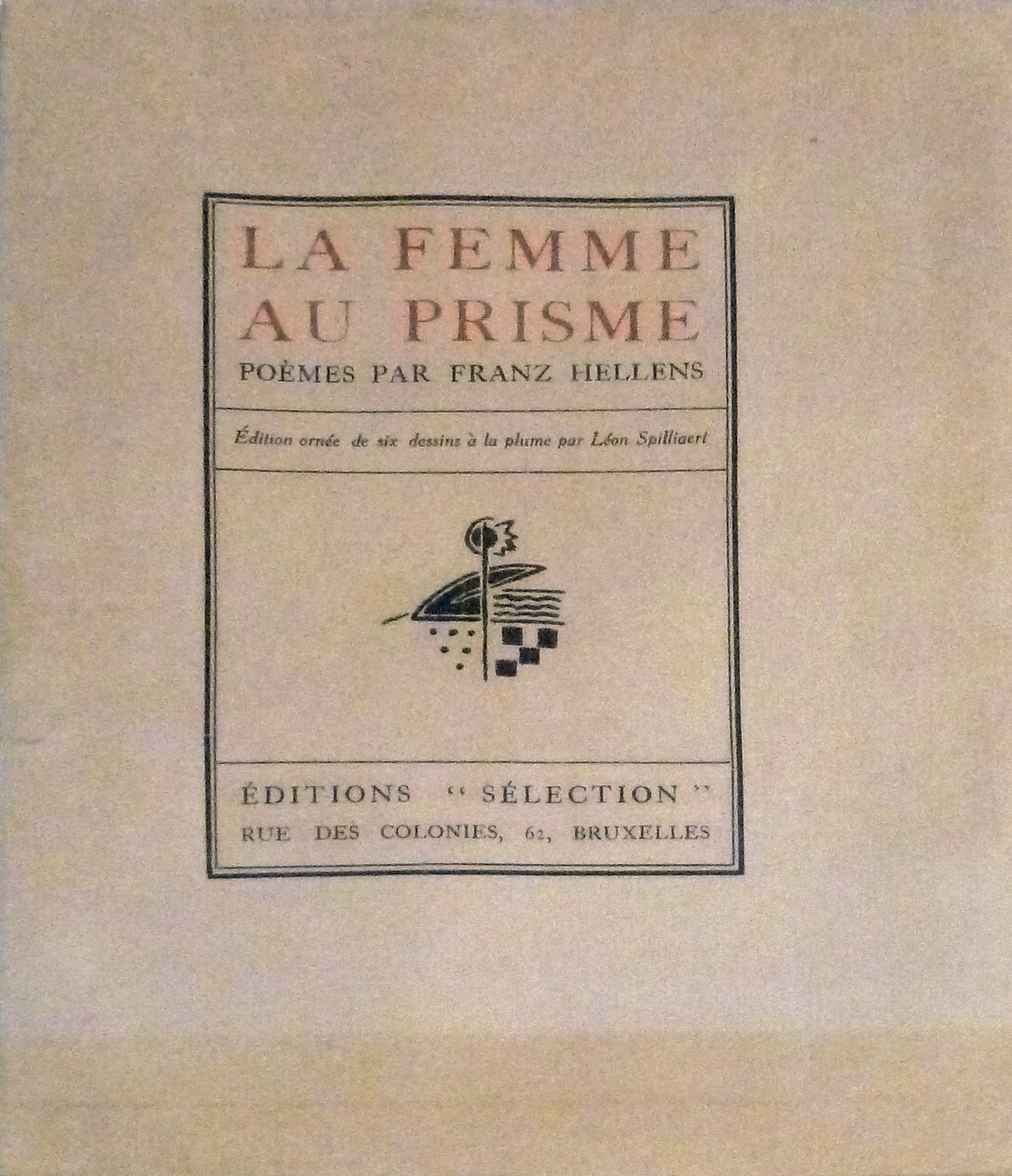 "La Femme au Prisme" (1920), titelblad van gedichtenbundel door Franz Hellens; privéverzameling